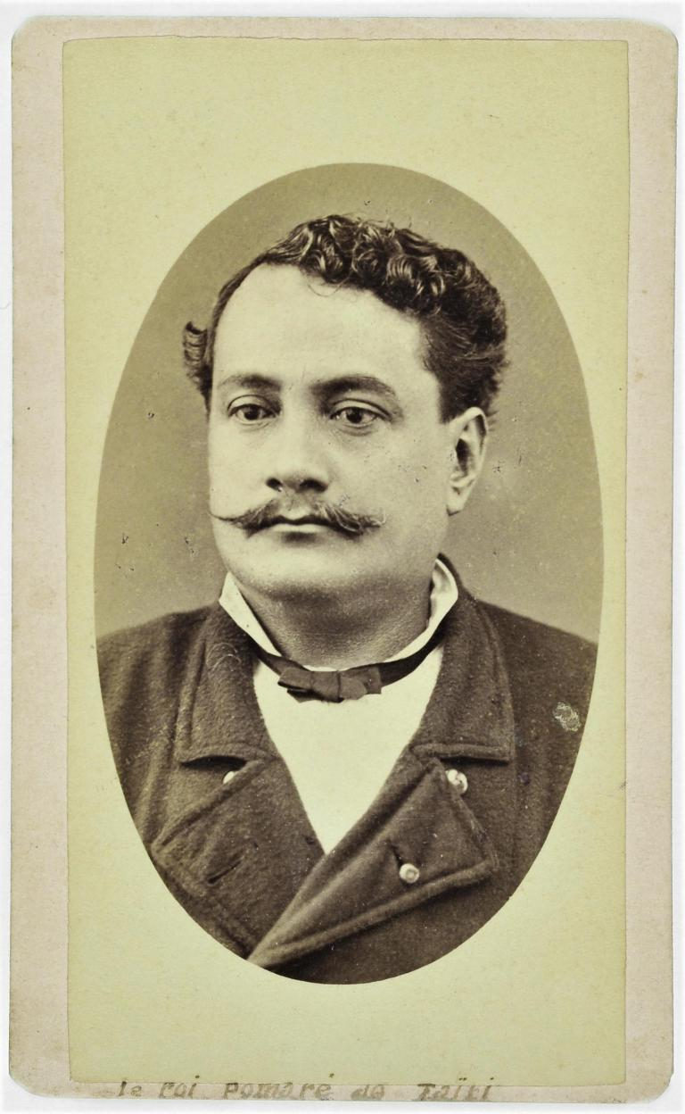 Portrait du roi Pomaré, Papeete, vers 1880. Tirage albuminé. Format carte de visite. Timbre humide au dos.